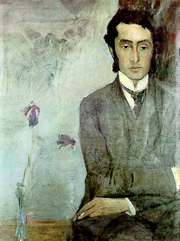 Portret_Doktora_Kupczyka